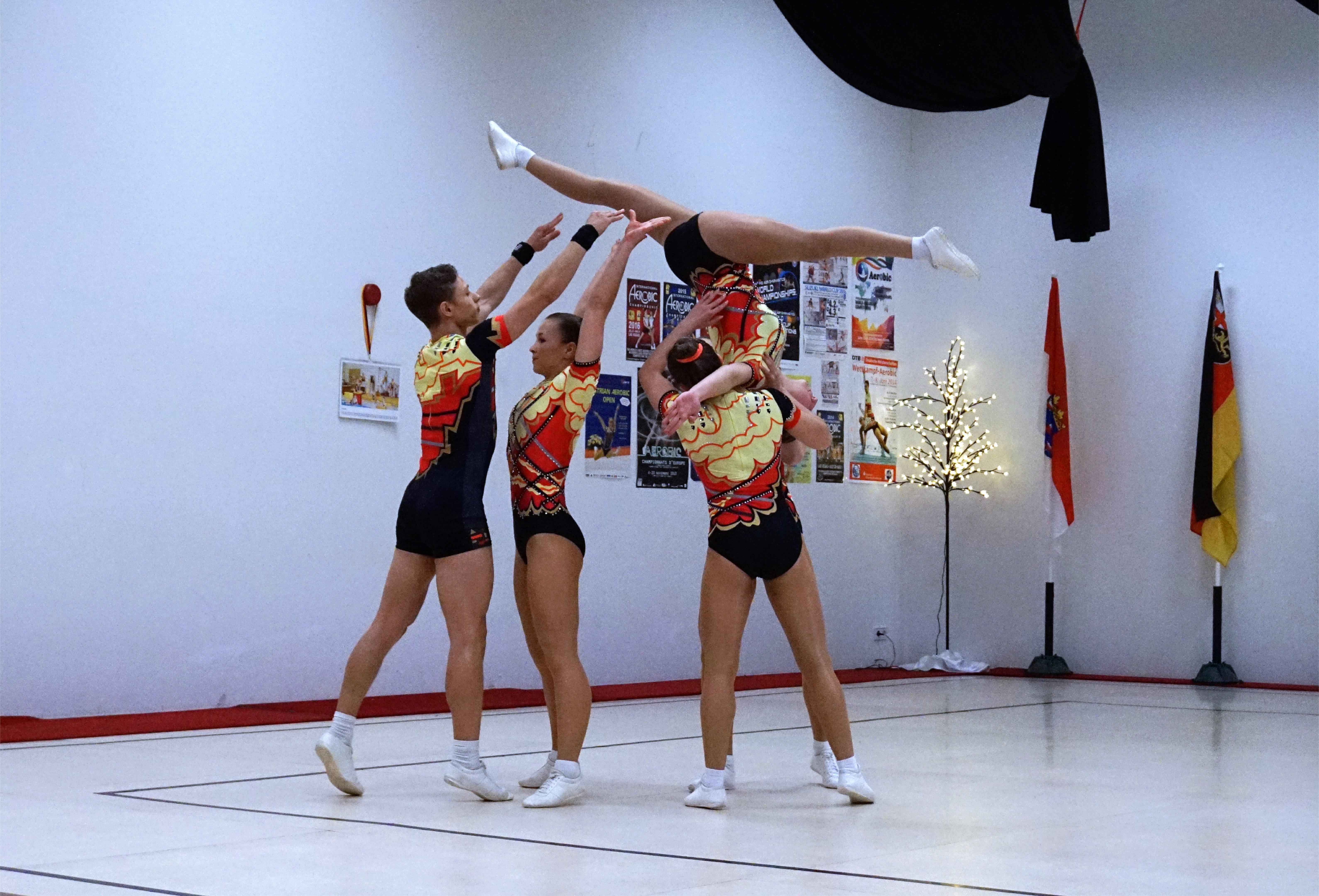 Gruppe Quali Hebefigur